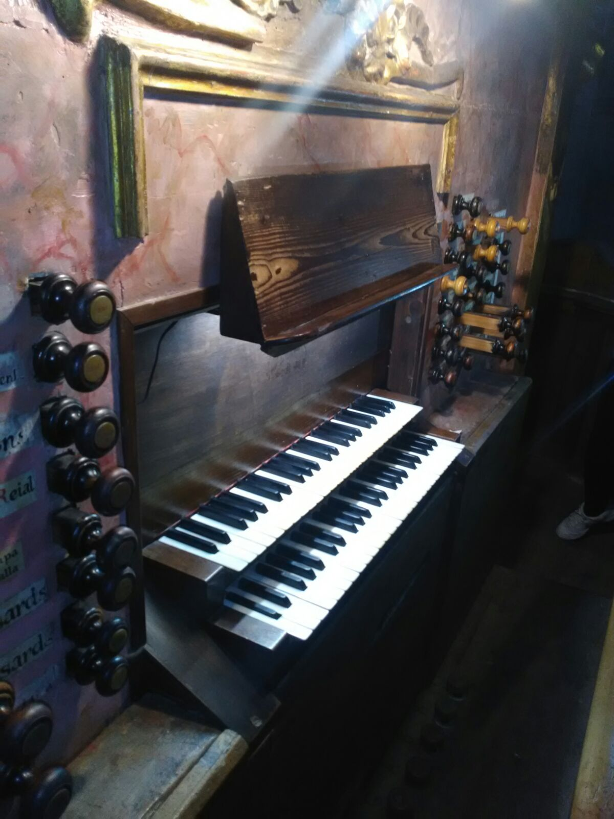 Aquesta imatge és la vista que hi ha dels dos teclats existents actualment, així com dels registres que componen l'orgue.